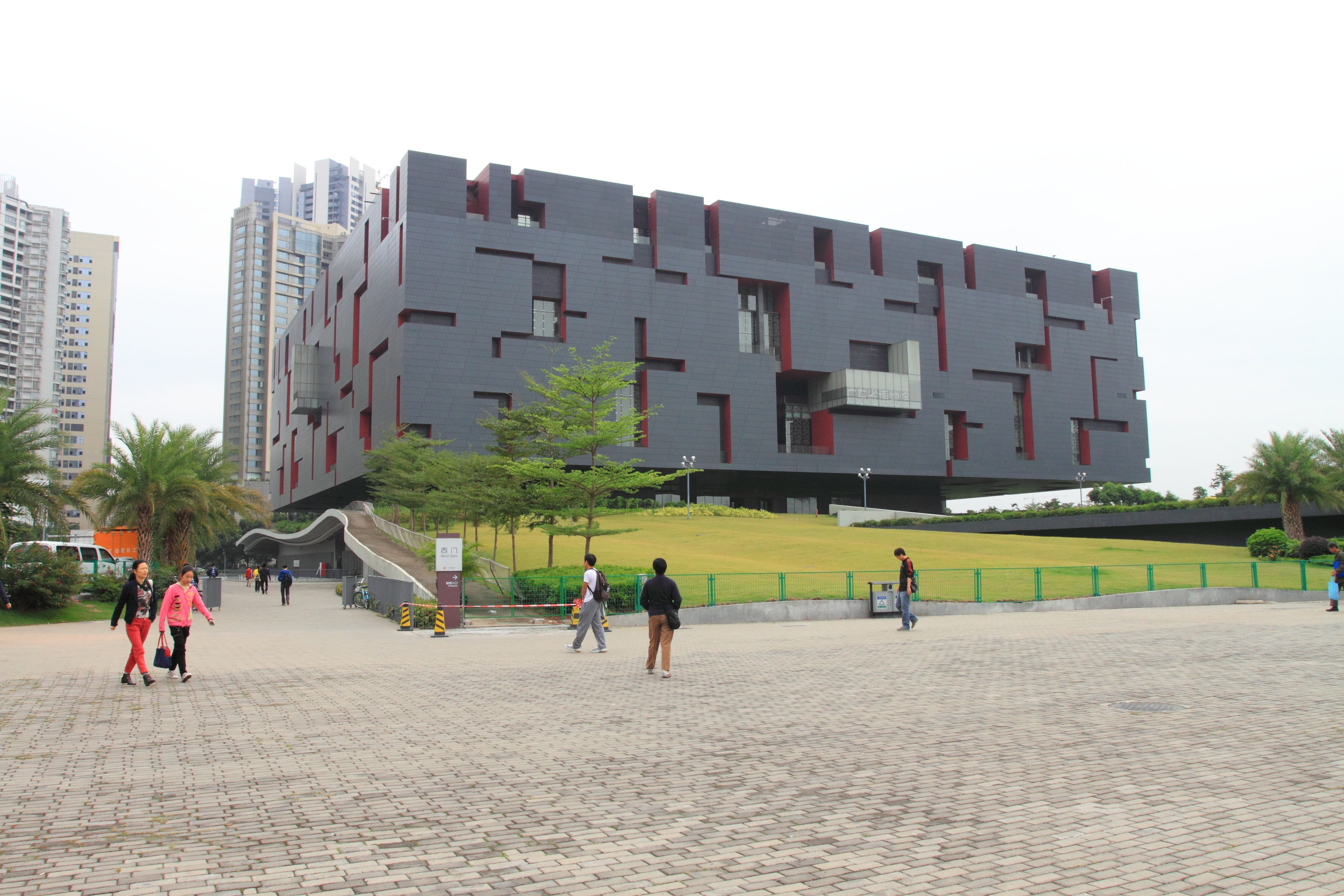 广州珠江新城广东省博物馆新馆 ——